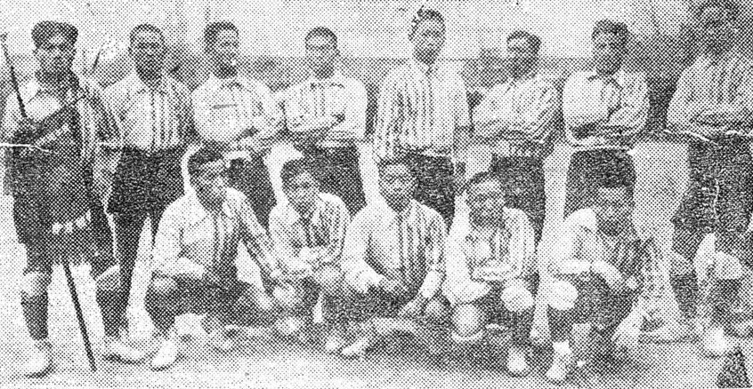 1923년 전국체육대회 축구(제4회 전조선축구대회) 청년부에서 우승한 불교청년회 선수단의 모습.